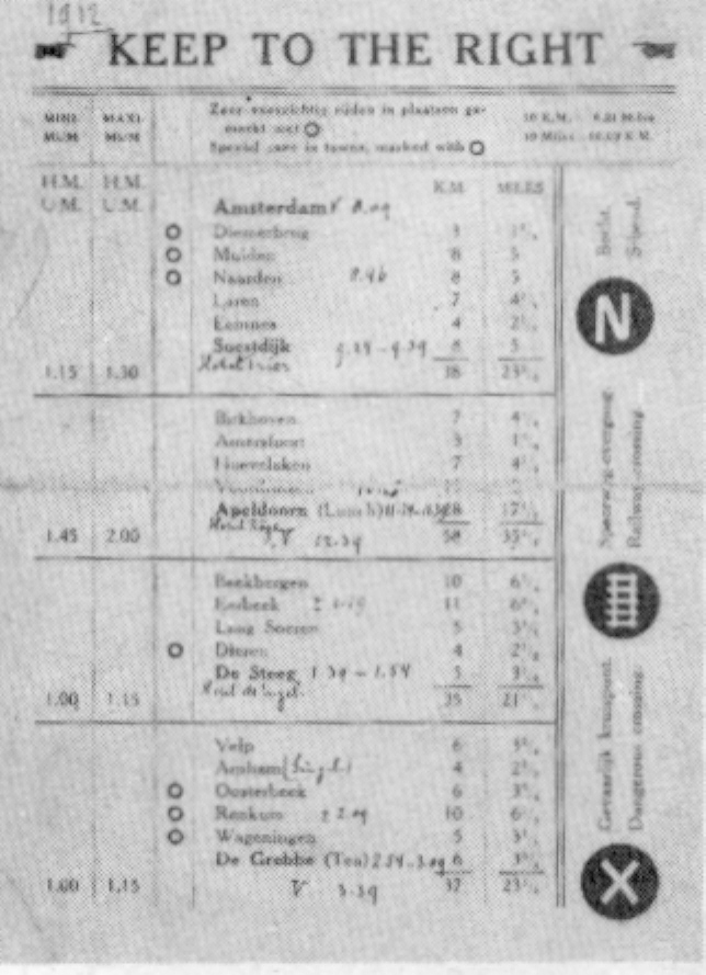 Routebeschrijving Anglo Dutch Reliability Trial 1912.